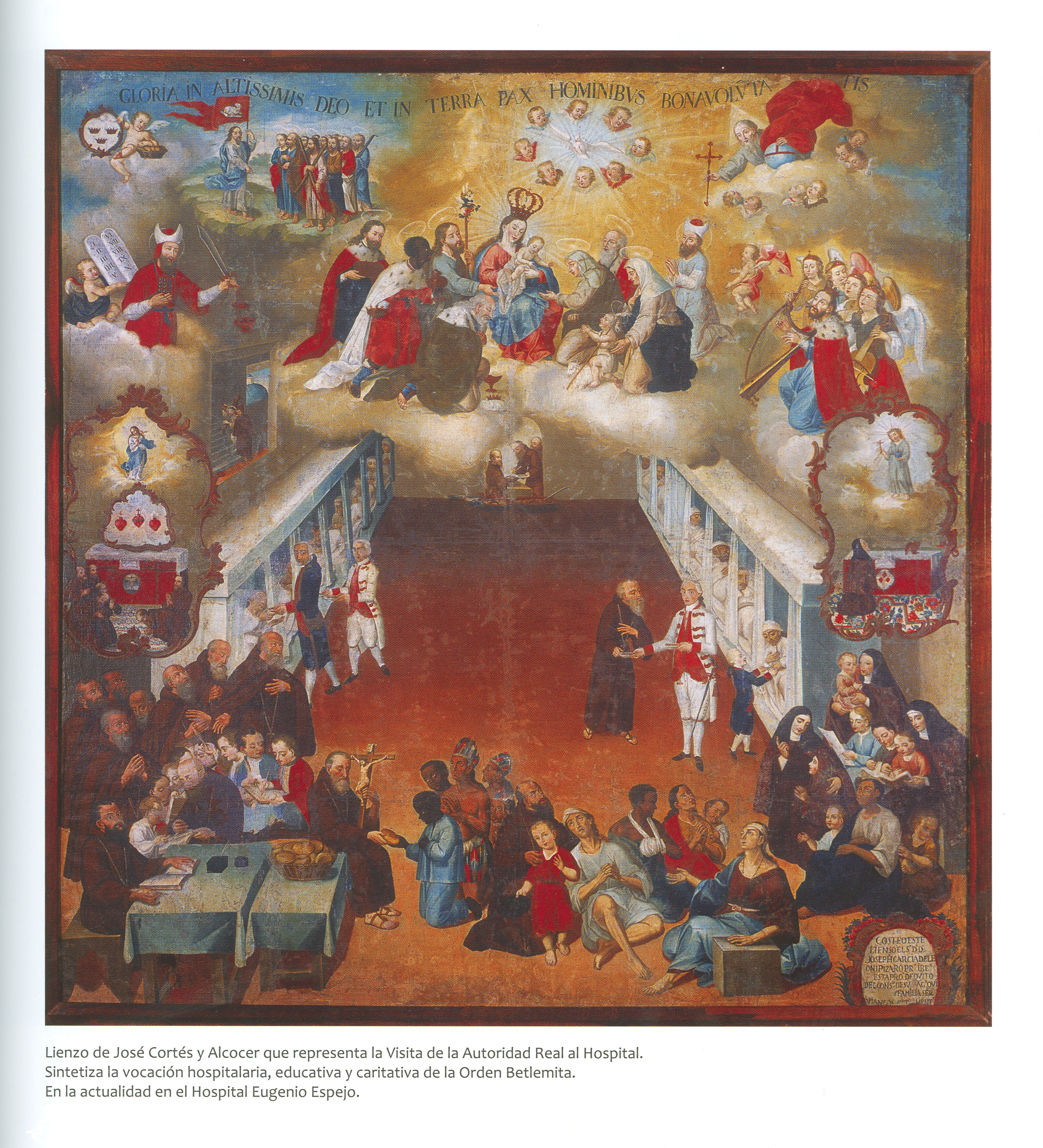 Moreno Egas, Jorge y Morán Proaño, Nancy.(2012). Historia del Antiguo Hospital San Juan de Dios de Quito / Tomo I: Epoca Colonial (1565-1830) Quito Ecuador: Fundación Museos de la Ciudad, Septiembre, 2012.Consultado y compartido por el usuario J. Javier García A.